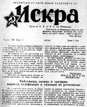 Вестник "Искра"